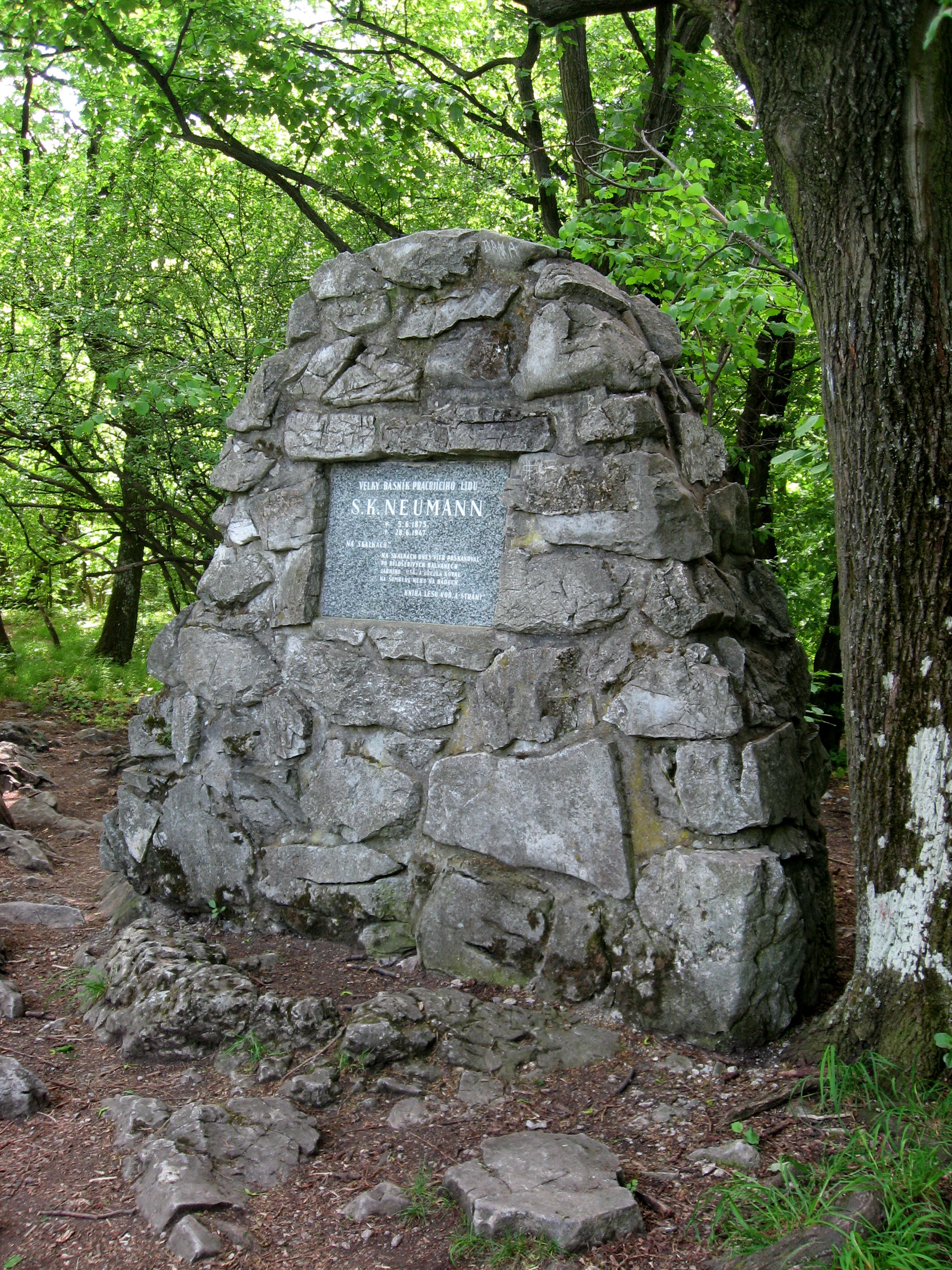 Památník S. K. Neumannovi